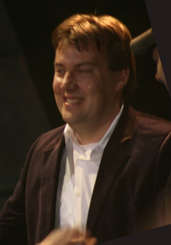 Miles Millar - Jules Verne Adventures Film Festival - 2007